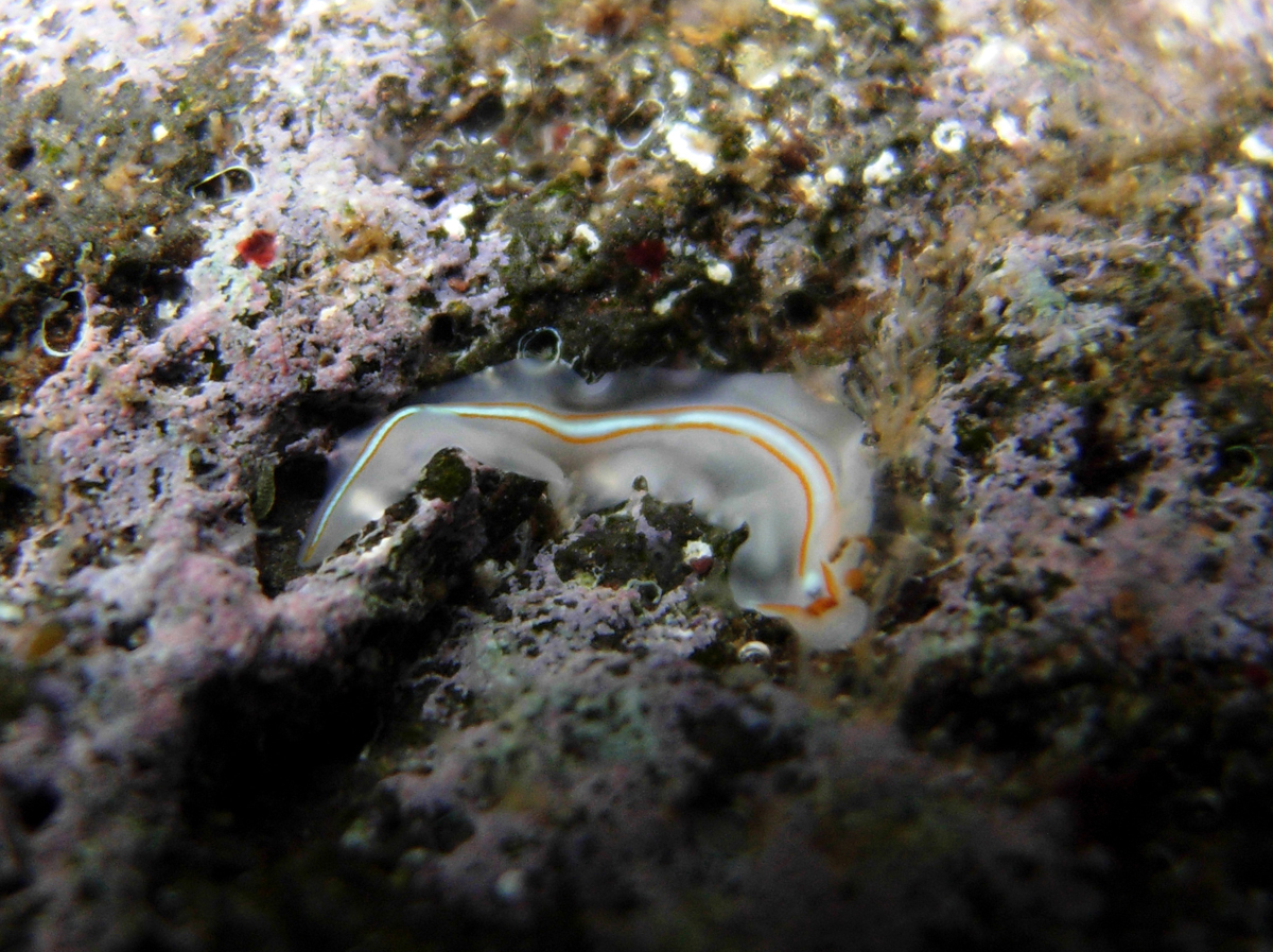 Un Prosthiostomum cf. trilineatum à la Réunion.